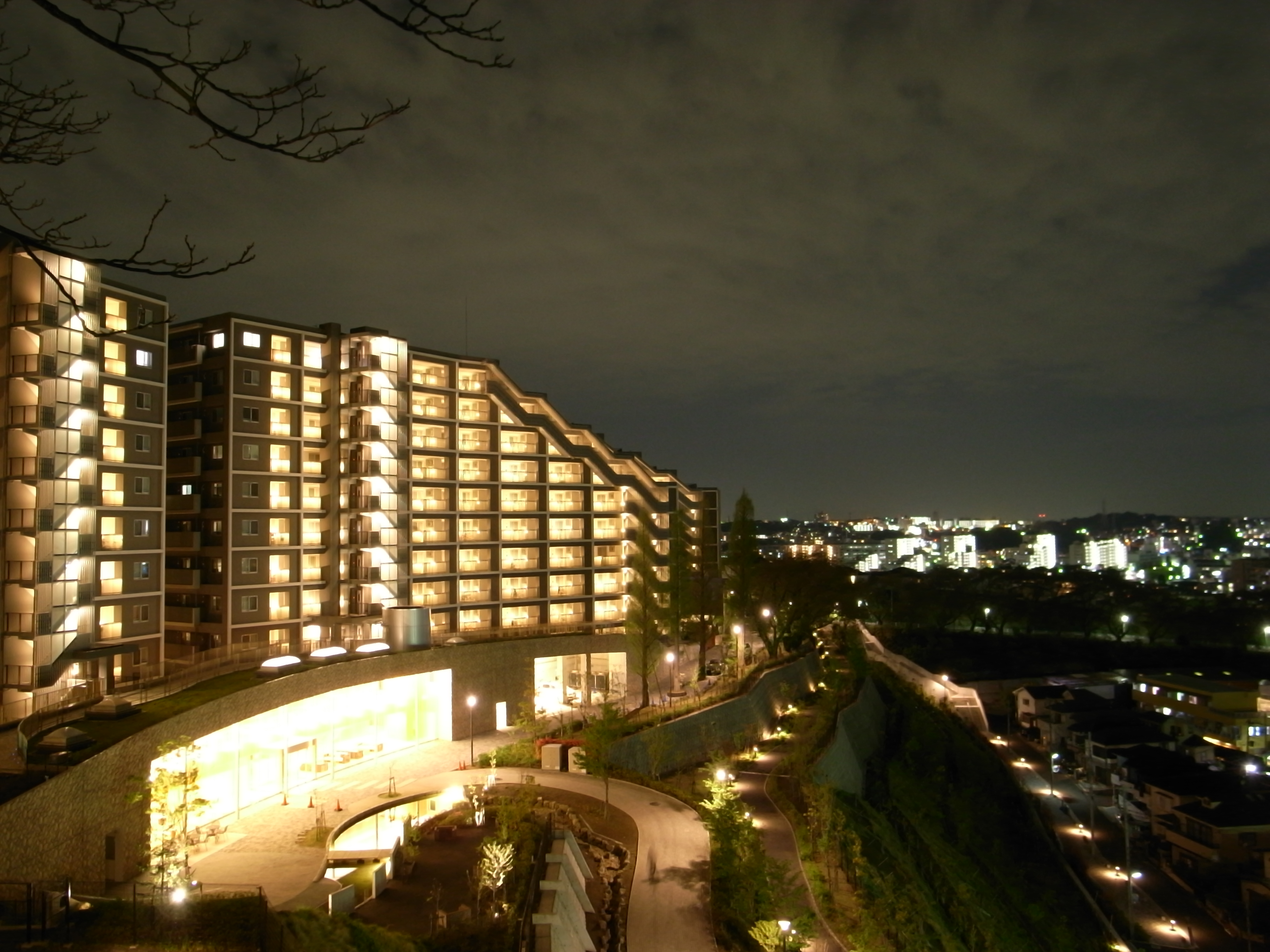 Yokohama Totsuka Night View / 横浜 戸塚 夜景